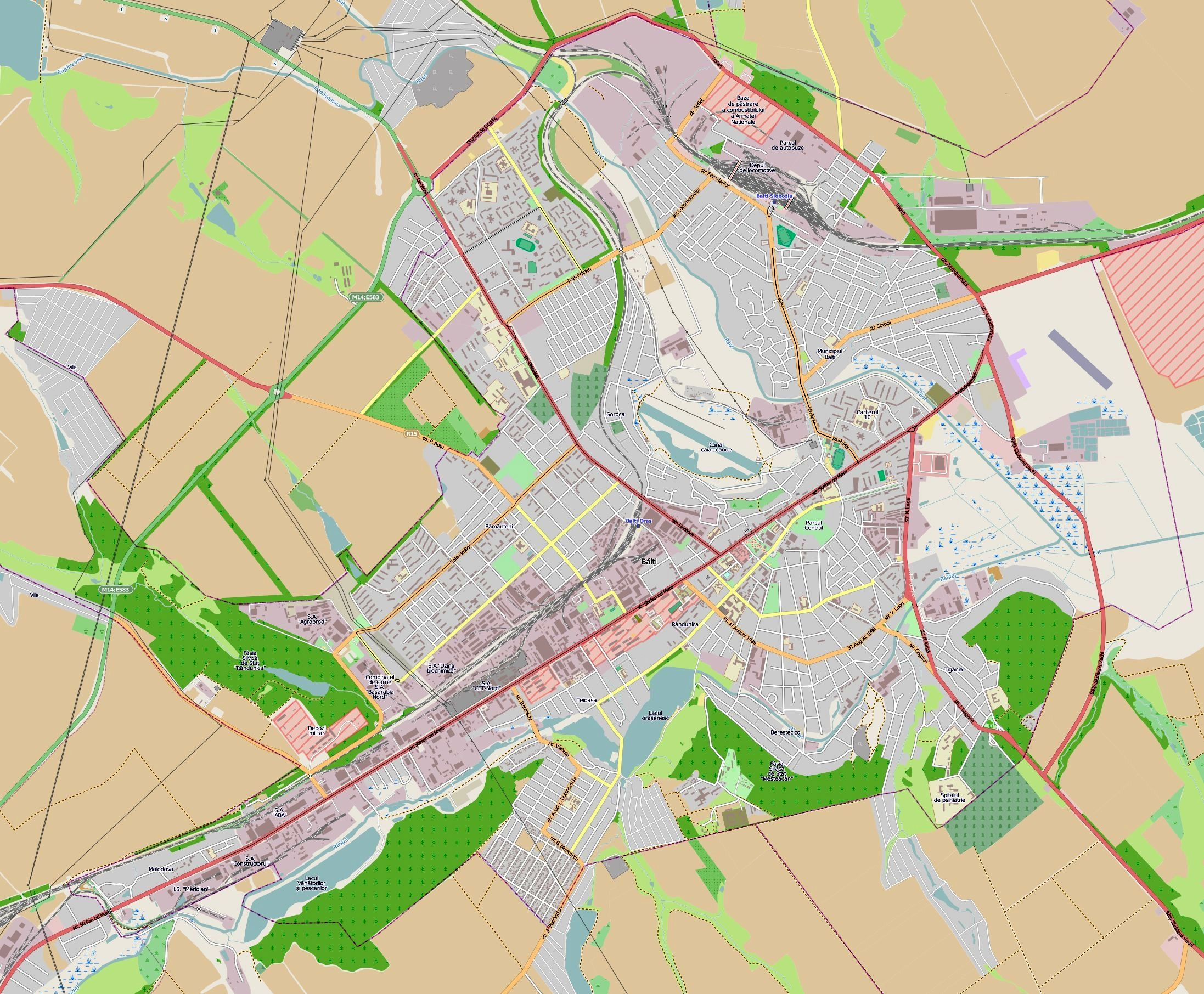 Harta municipiului Balti calibrata pe coordonatele: 47.8016N - 27.8428E si 47.725N - 27.975E.